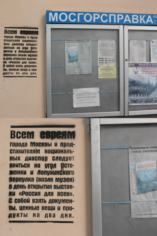 Антисемитские граффити в Москве на пересечении Покровки и Армянского переулка почти полностью копируют злополучные нацистские листовки, развешанные в местечке Бабий Яр на Украине.